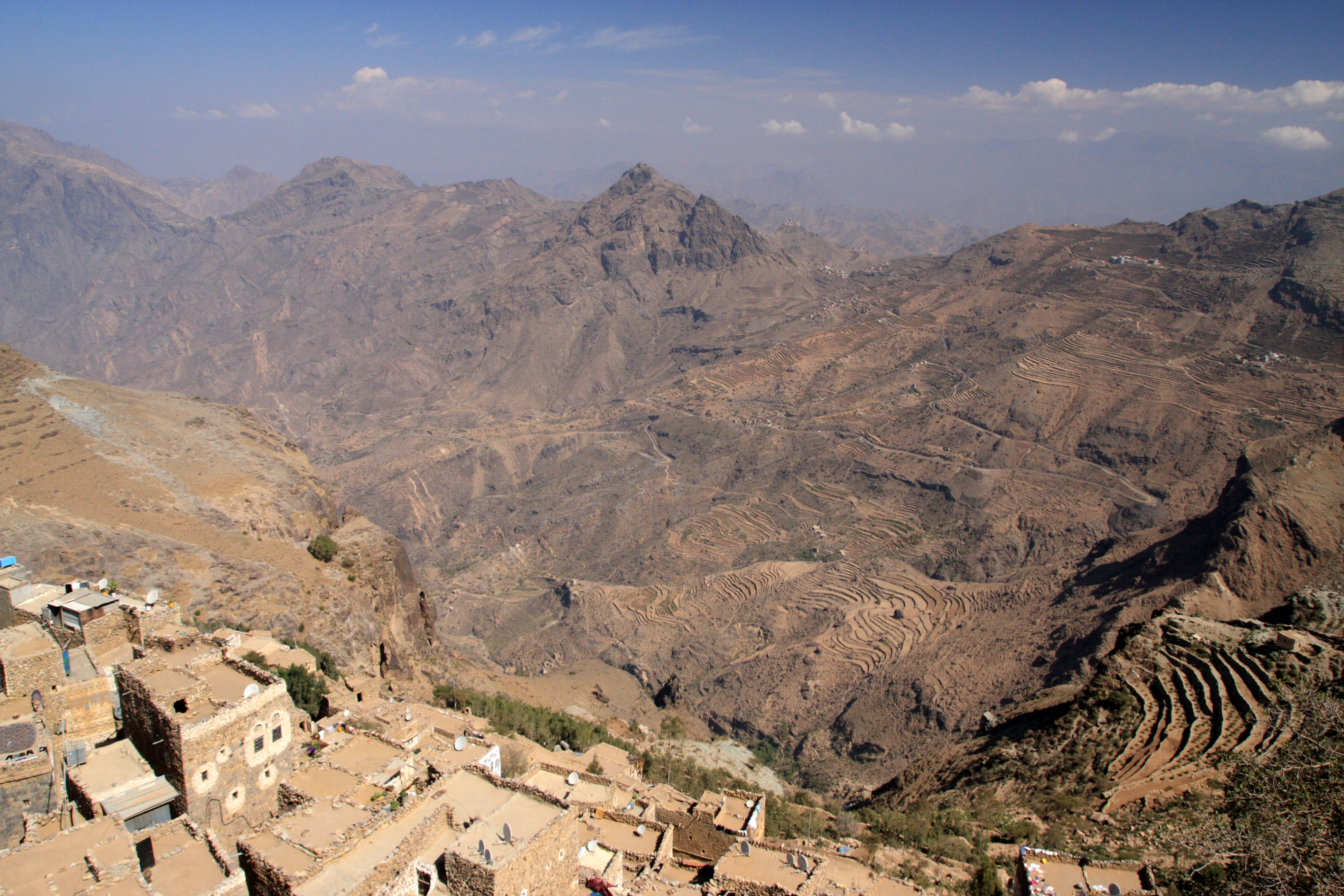 Al Hajjarah